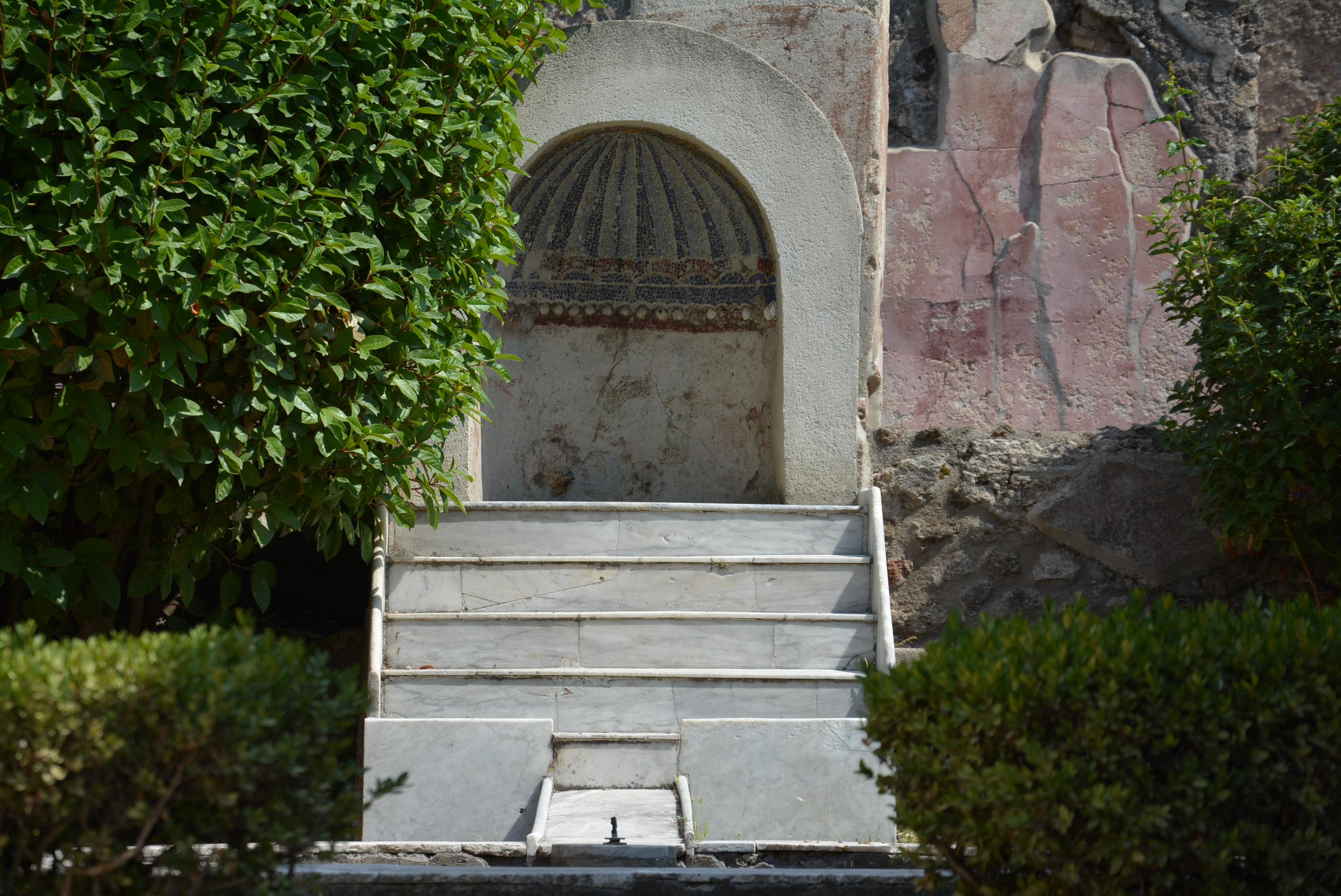 Casa di Marco Lucrezio - MIBACT This is a photo of a monument which is part of cultural heritage of Italy.